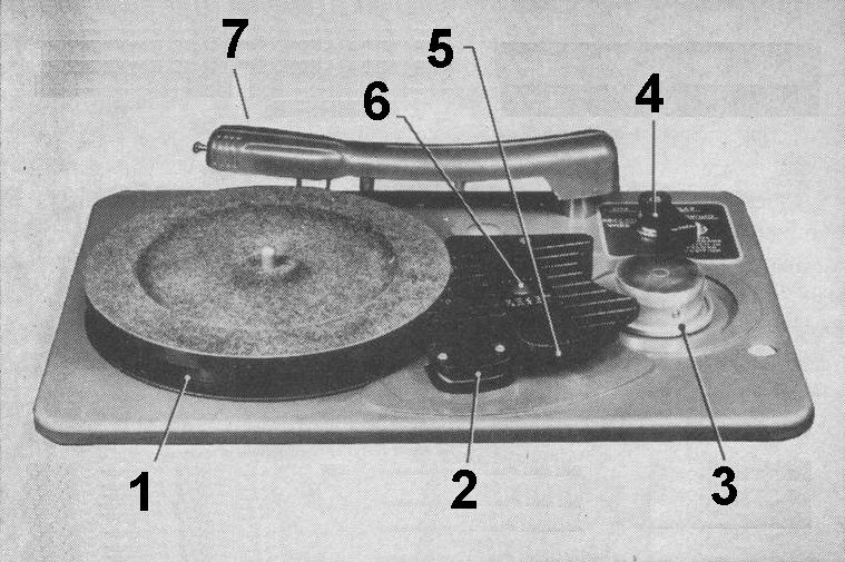 Es una foto de un tocadiscos con grabador de alambre: 1)Combinación de platogiradiscos y carrete receptor de alambre 2)Cabeza magnetica, también sirve para giar el alambre para que se bobine mejor 3)Carrete almacenador 4)Selector para reproducción, grabación o rebobinado 5)Registrador para saber cuando alambre ha pasado 6)Botón reset del contador 7)Brazofonocaptor del tocadiscos